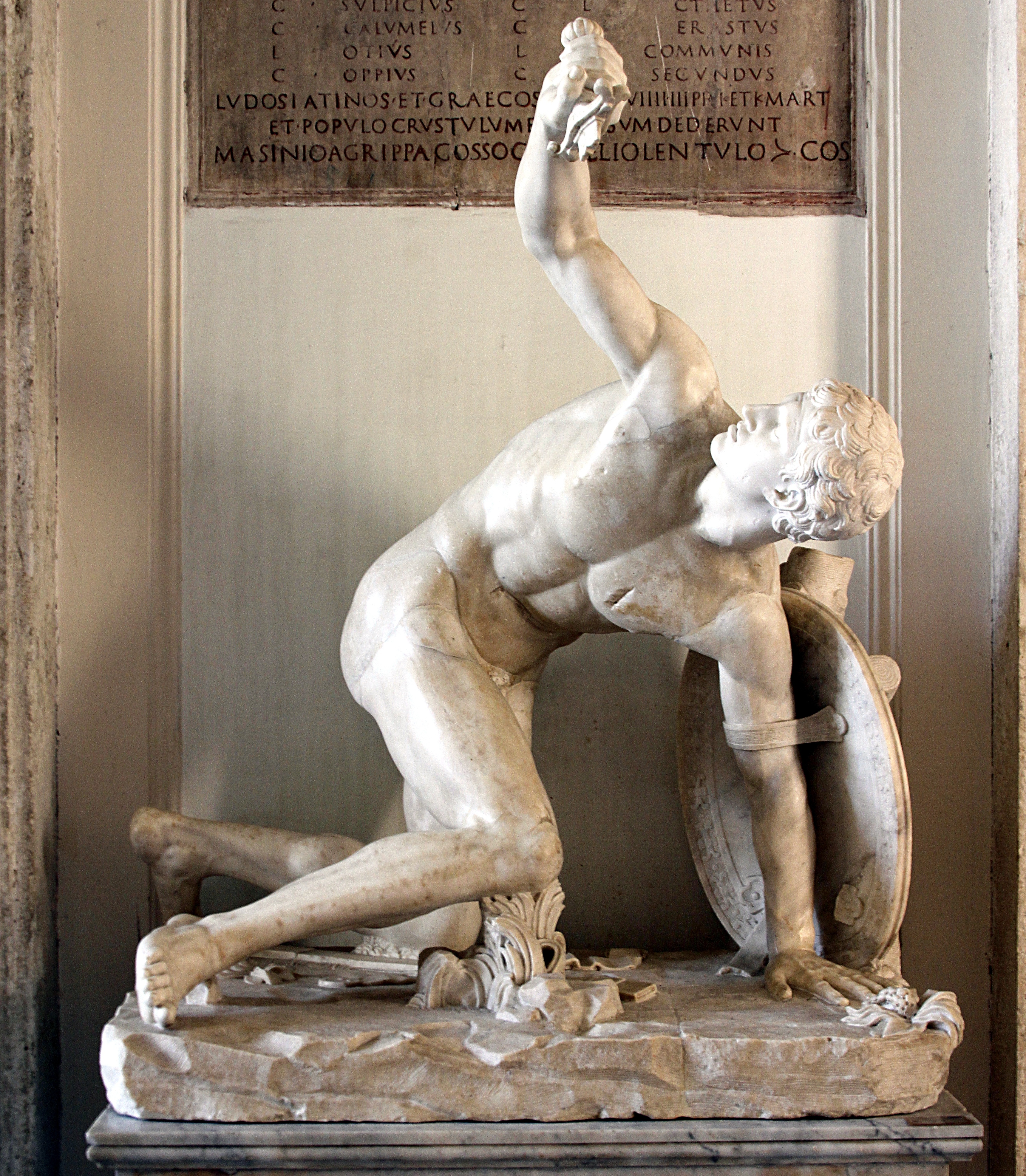 Palazzo Nuovo - Musei Capitolini - Rome